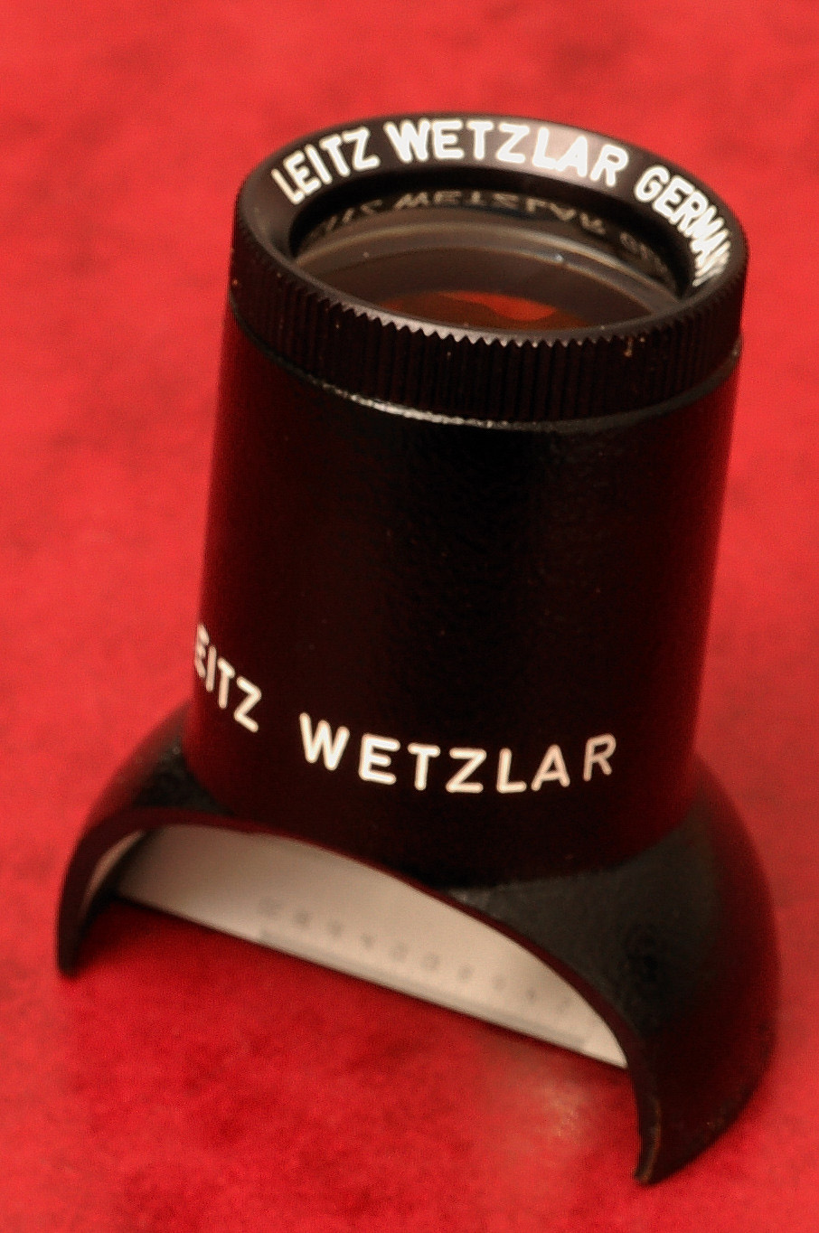 Messlupe mit Aplanat 6x und Strichplatte 20 mm/0,1 mm